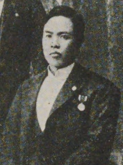 折田兼至（1858-1923）